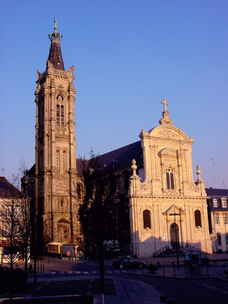 La cathédrale Notre-Dame de Cambrai